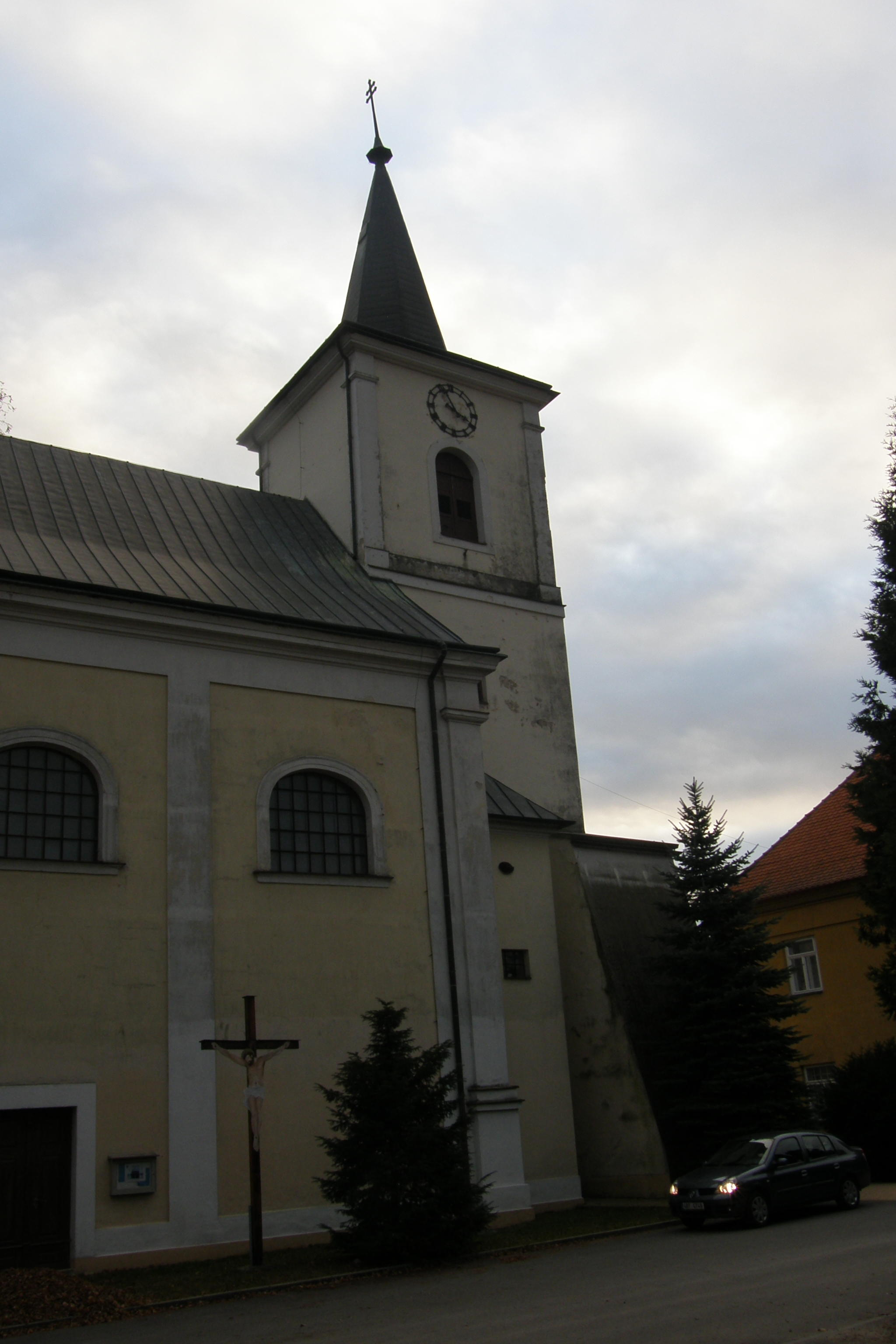 Kostel svatého Jana Křtitele v Doubravici nad Svitavou